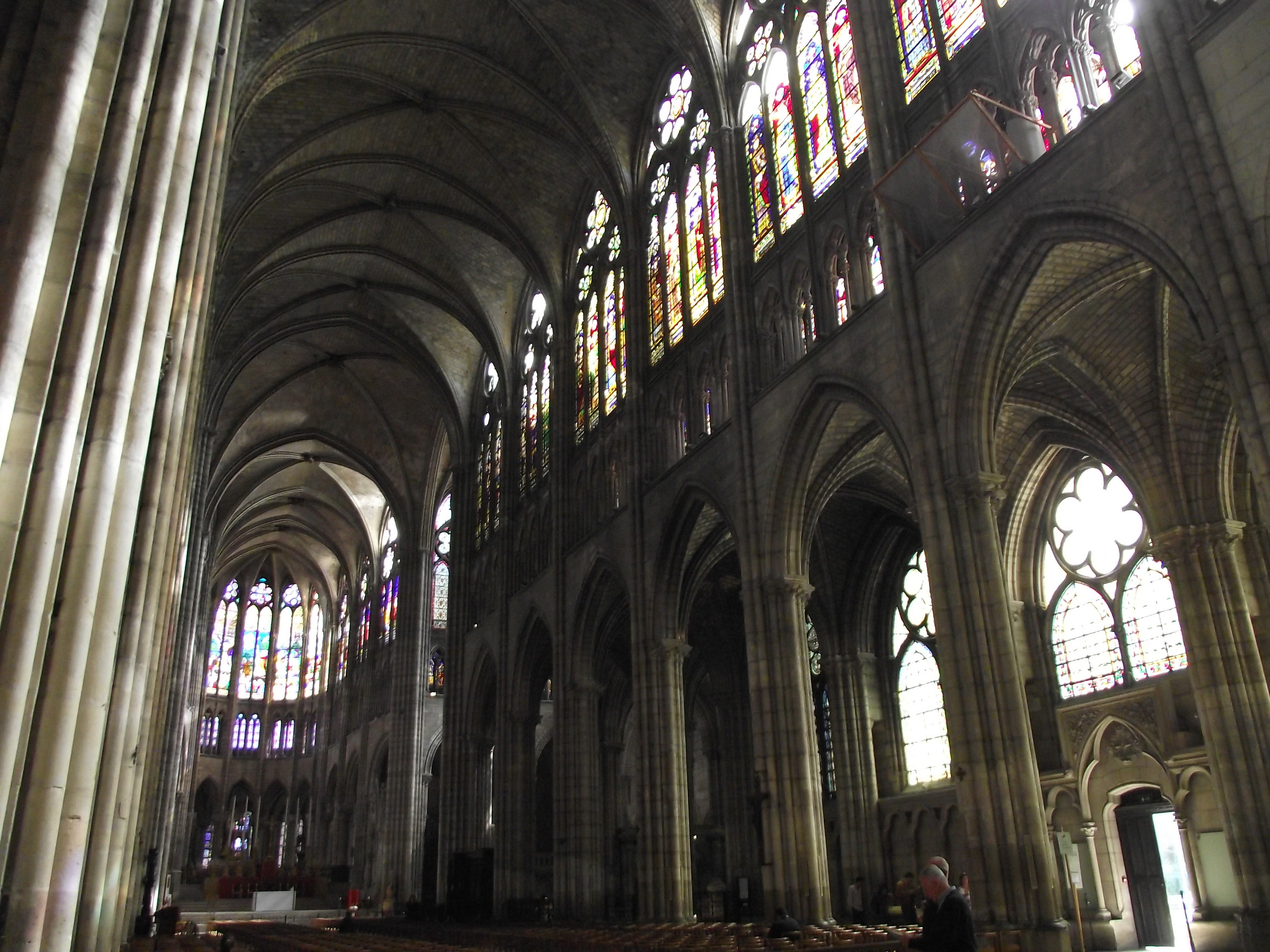 Basilique Saint-Denis